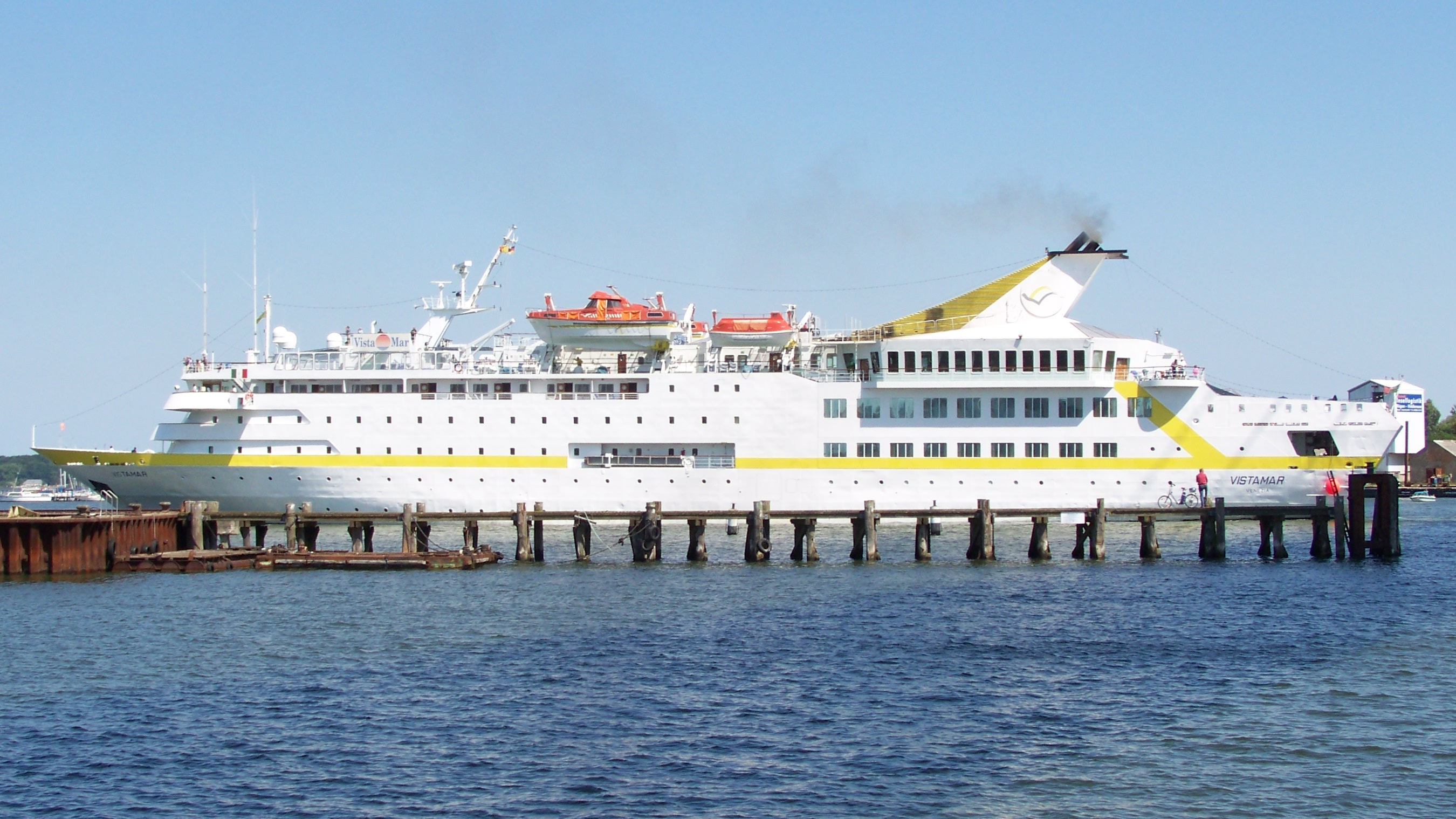 Das Kreuzfahrtschiff VISTAMAR bei der Durchfahrt des Ziegelgrabens in Stralsund zur Anfahrt des Stralsunder Hafens am 02.07.2008.